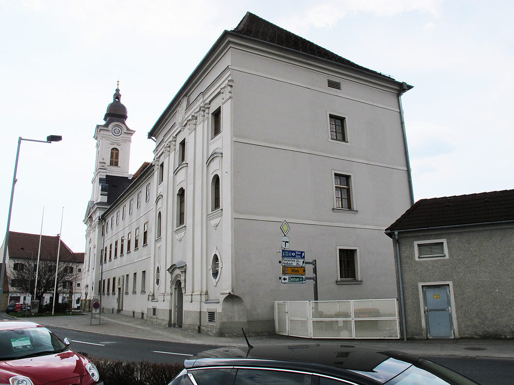 Das Gleisdorfer Bezirksgericht, vormals Kloster bei der Marienkirche